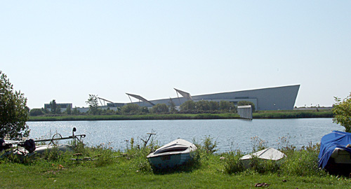 Artmuseum Arken near Copenhagen, Denmark